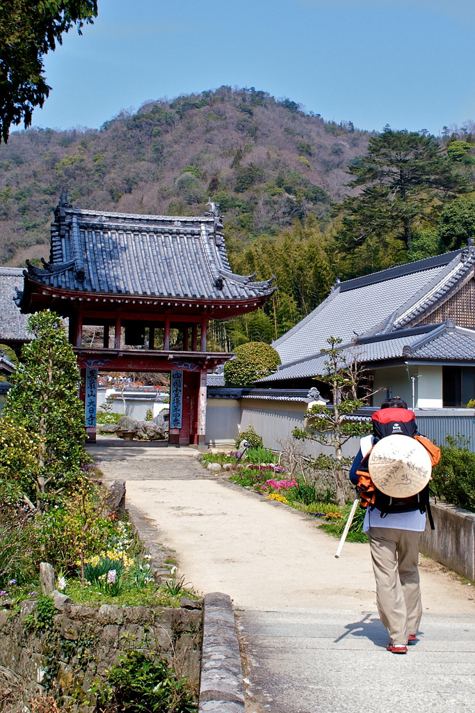 四国八十八箇所巡礼者。大日寺（徳島県板野町）にて。